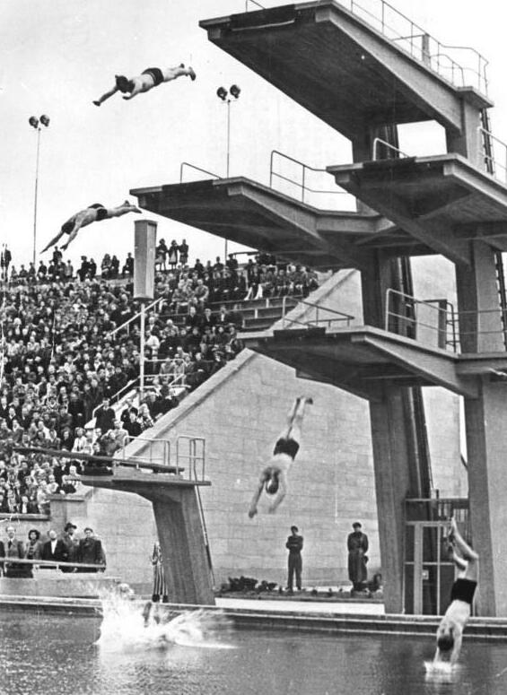 Zentralbild-Illner Zi-Qu 27.5.1952 IV. Parlament der Freien Deutschen Jugend in Leipzig 1952 (25.5.1952) I. Schwimmveranstaltung im neuen Schwimmstadion in der Stalin-Allee in Leipzig zu Ehren der Bauarbeiter. UBz Turm- und Kunstspringen der Bauarbeiter.